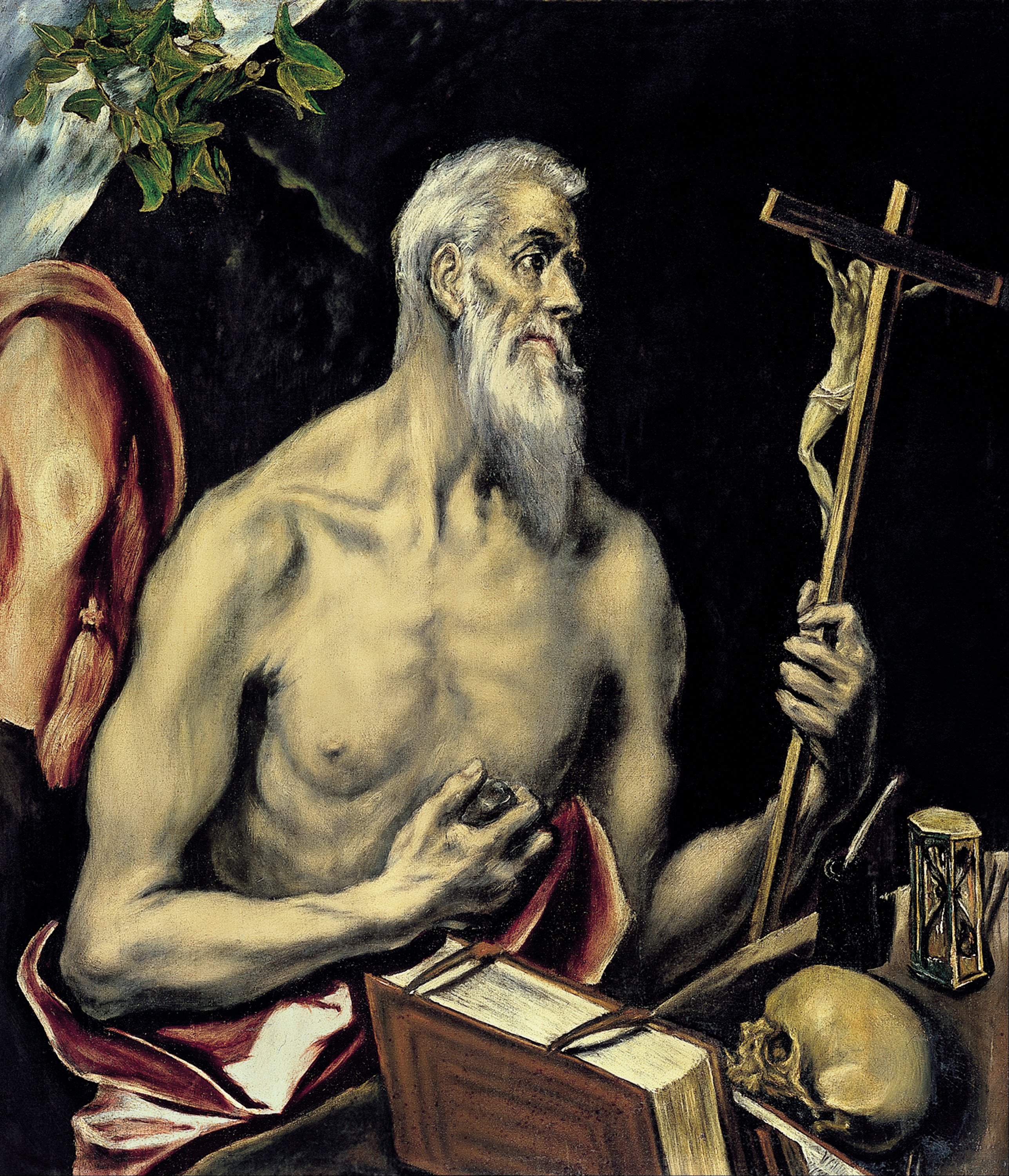 El lienzo representa a San Jerónimo de Estridón, uno de los Padres de la Iglesia, contemplando una imagen de Cristo crucificado.